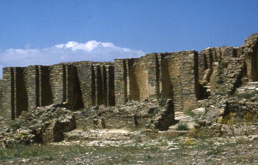 Kalâa des Béni Hammad, Algerie